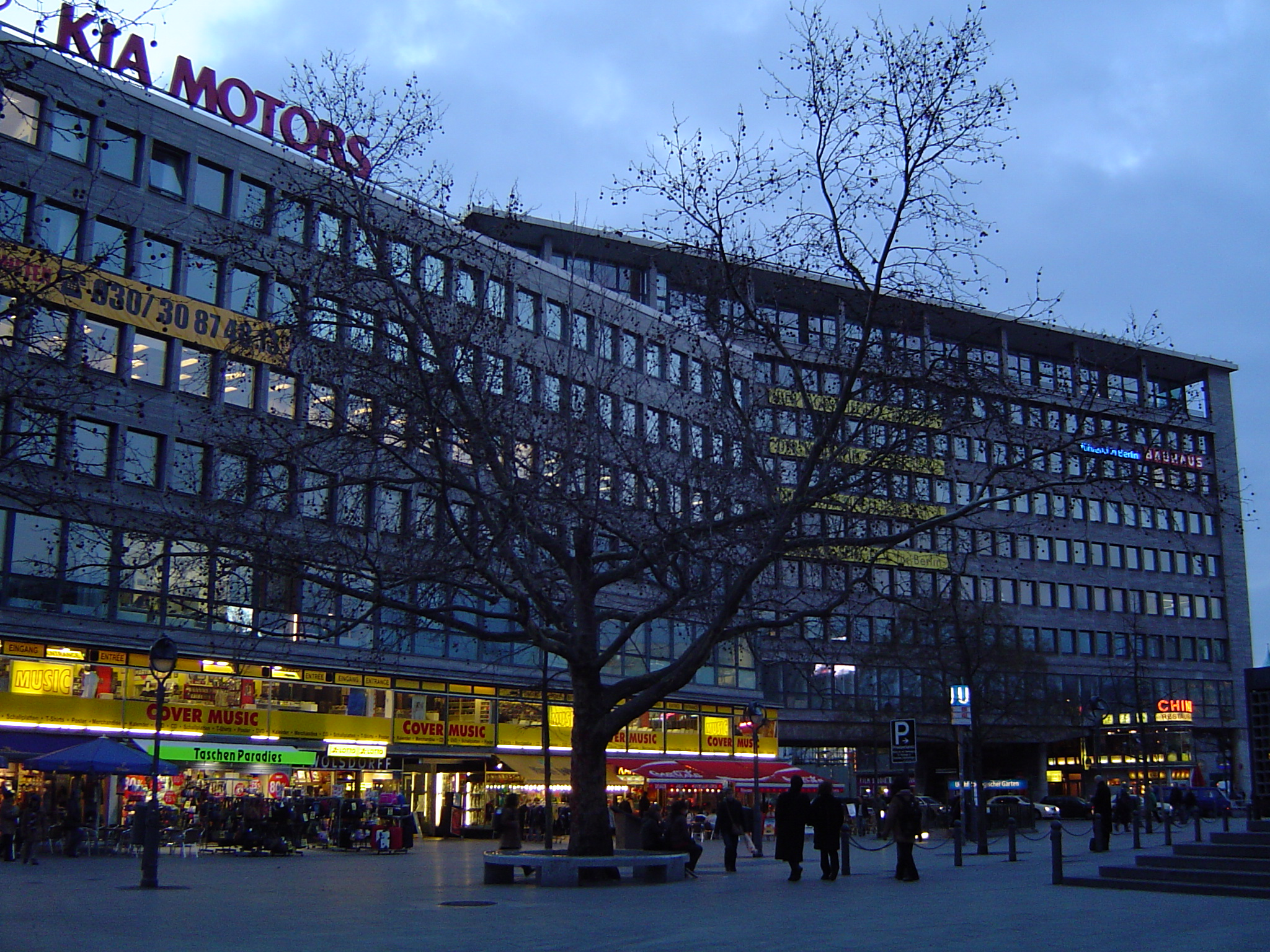 Schimmelpfeng-Building in Berlin-Charlottenburg, Germany